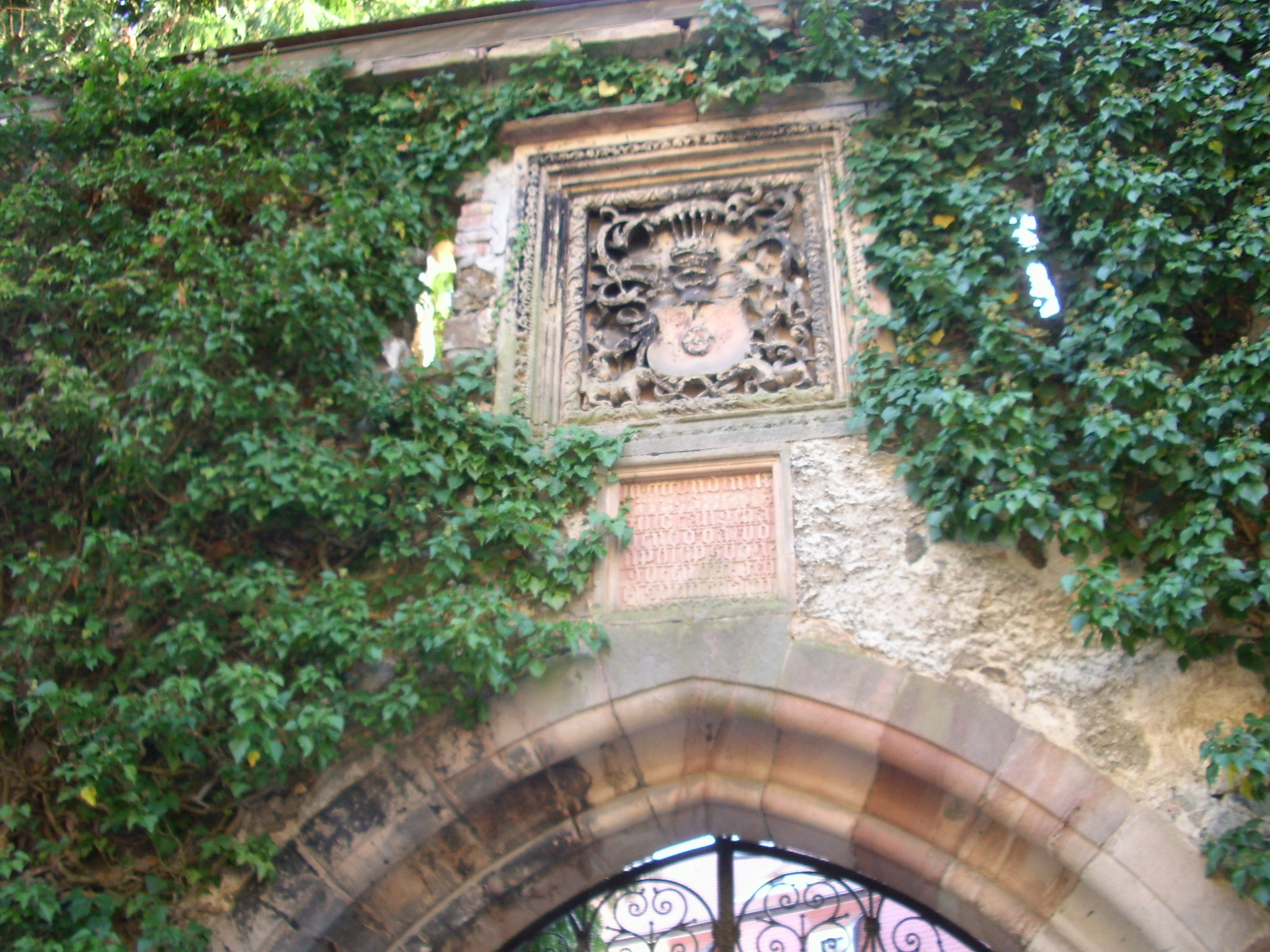 Das Wappen der Familie von Guttenberg am Schloßtor der neuen Anlage